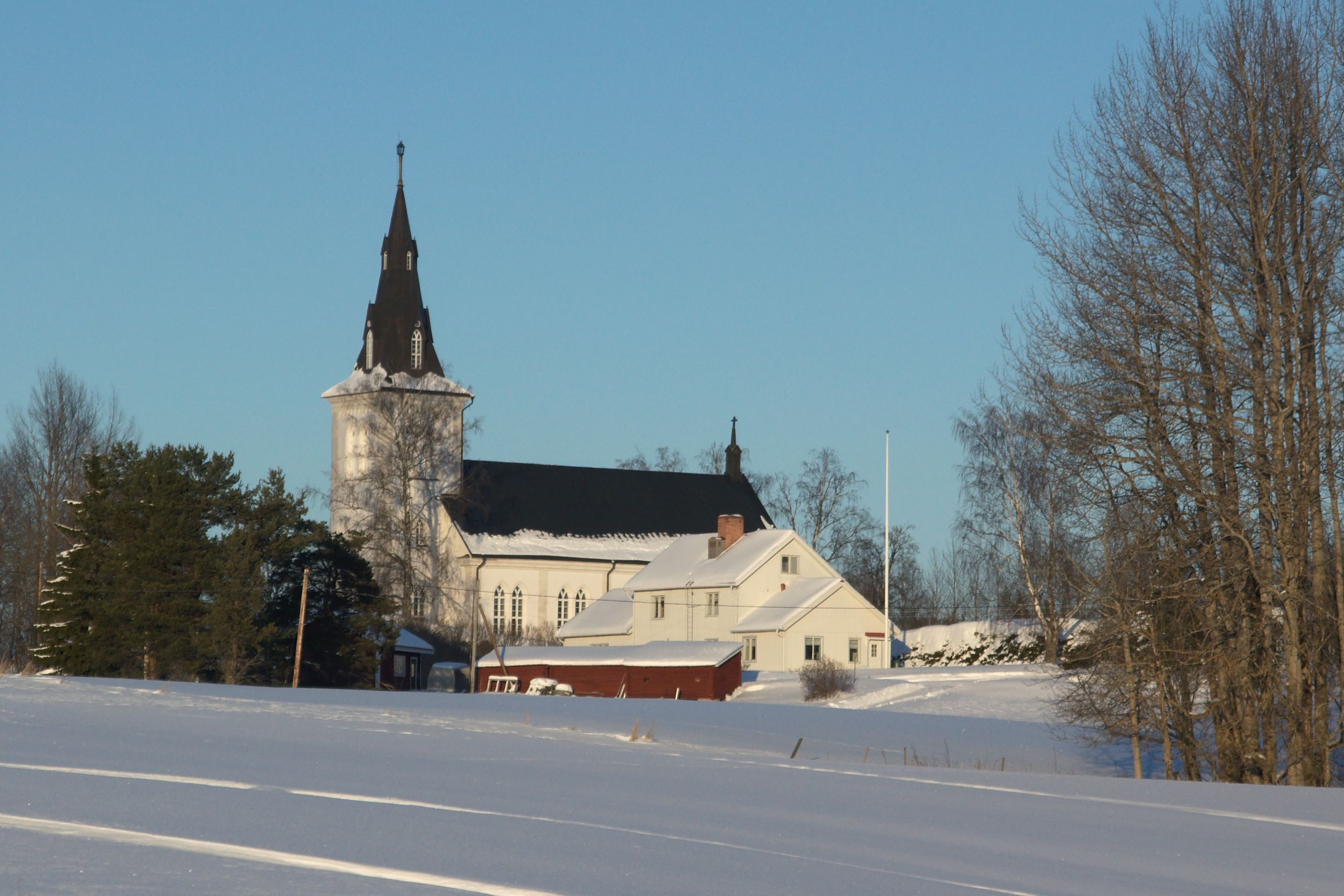 Näskotts kyrka